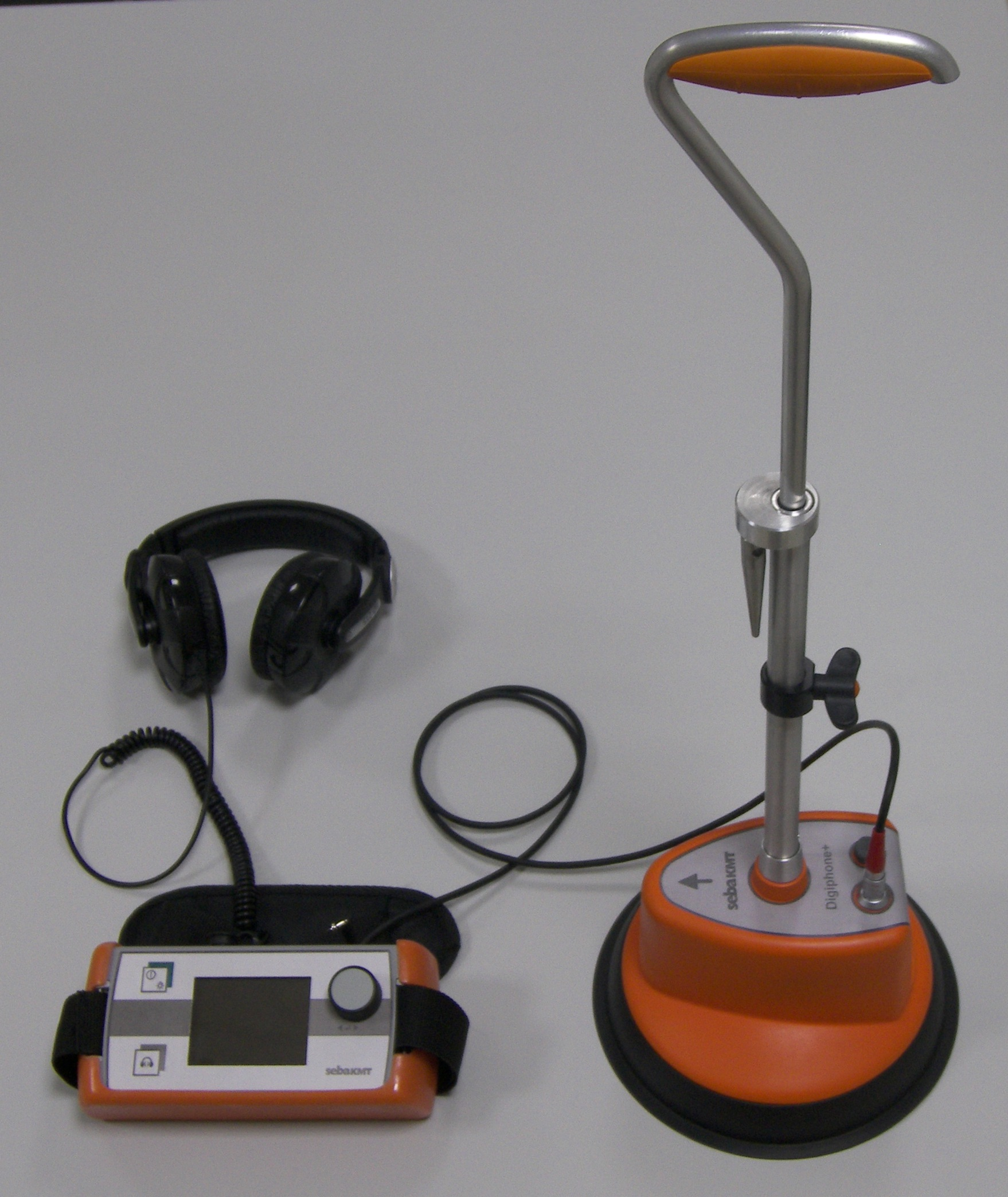 SebaKMT: Nachortungsgerät Digiphone+ (Kabelfehlerortung)